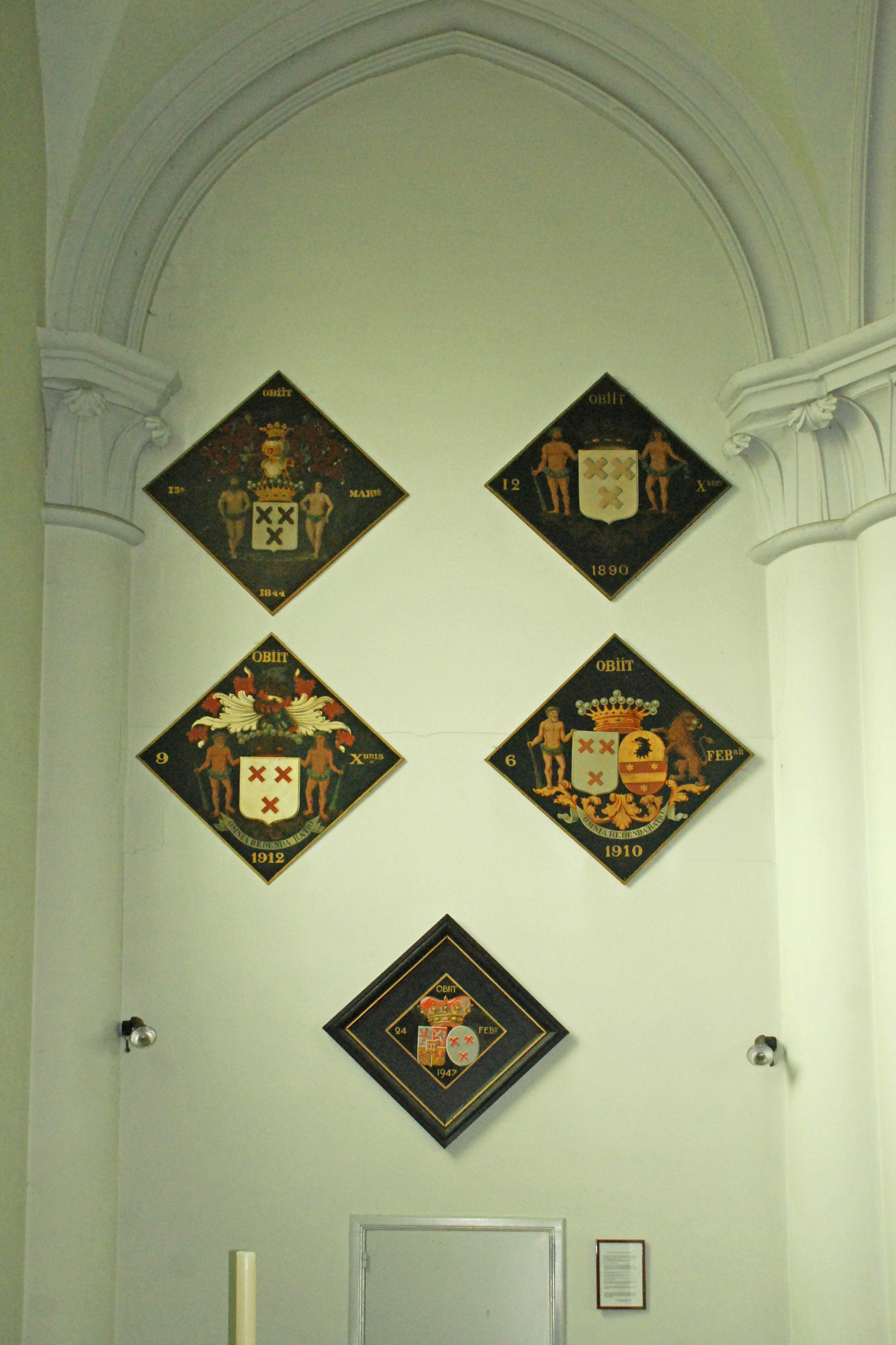 Belgique - Brabant wallon - Ottignies-Louvain-la-Neuve - Céroux - église Notre-Dame de Bon Secours (néo-gothique, Antoine Moreau, 1848)